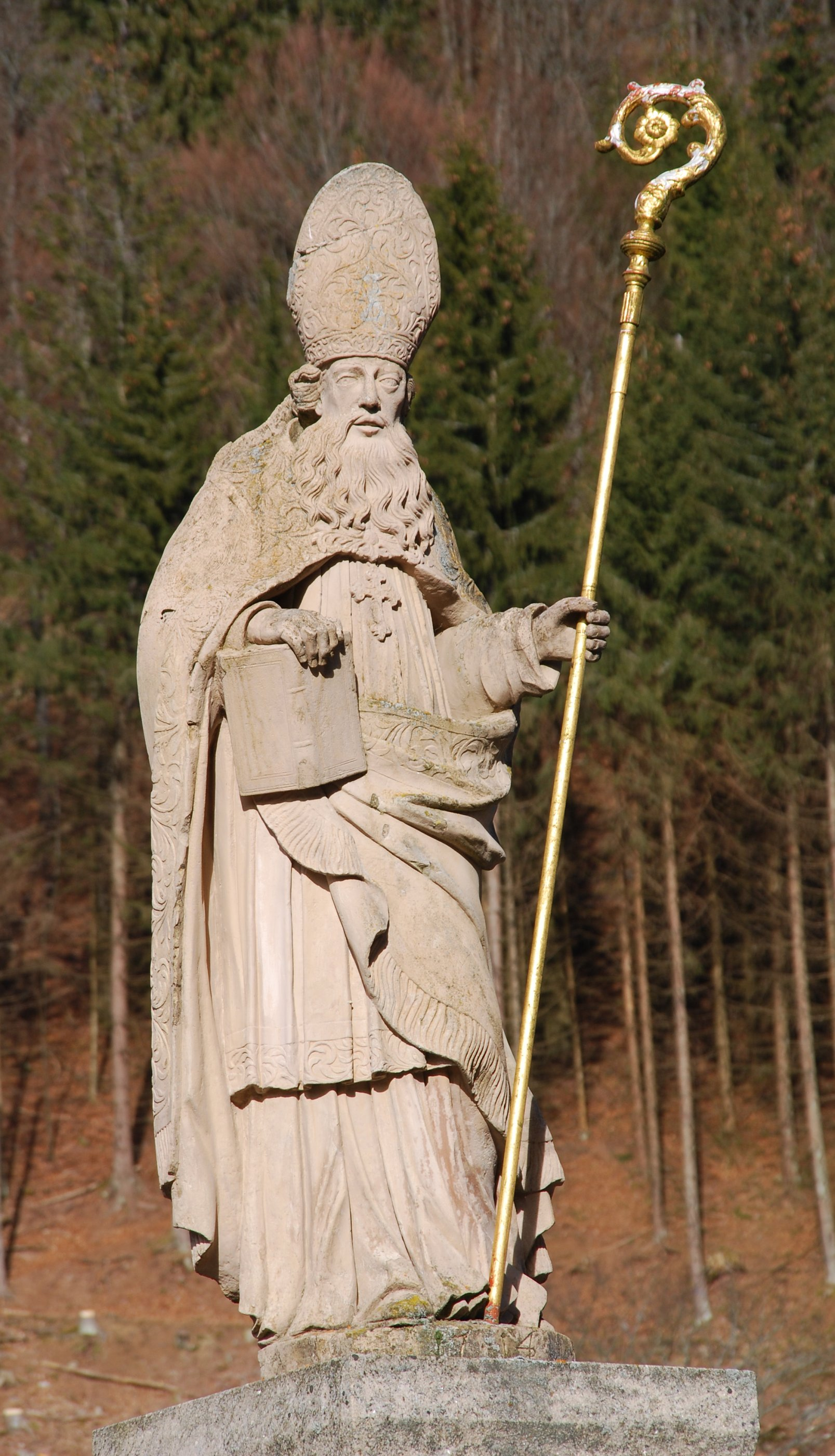 Blasiusbrunnen auf dem Domplatz in St. Blasien